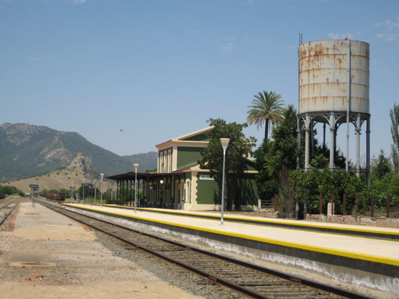 Vista general de la estación de Almorchón desde el lado de Madrid.